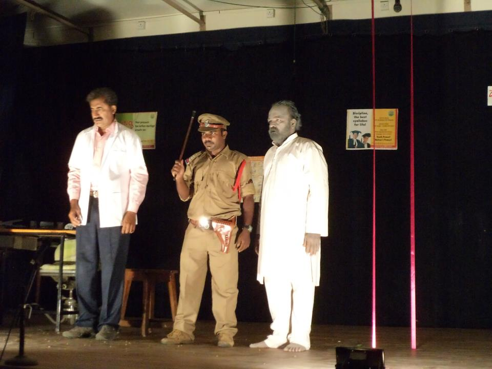 దయ్యాలున్నాయి జాగ్రత్త! నాటకంలో మల్లేశ్ బలష్టు